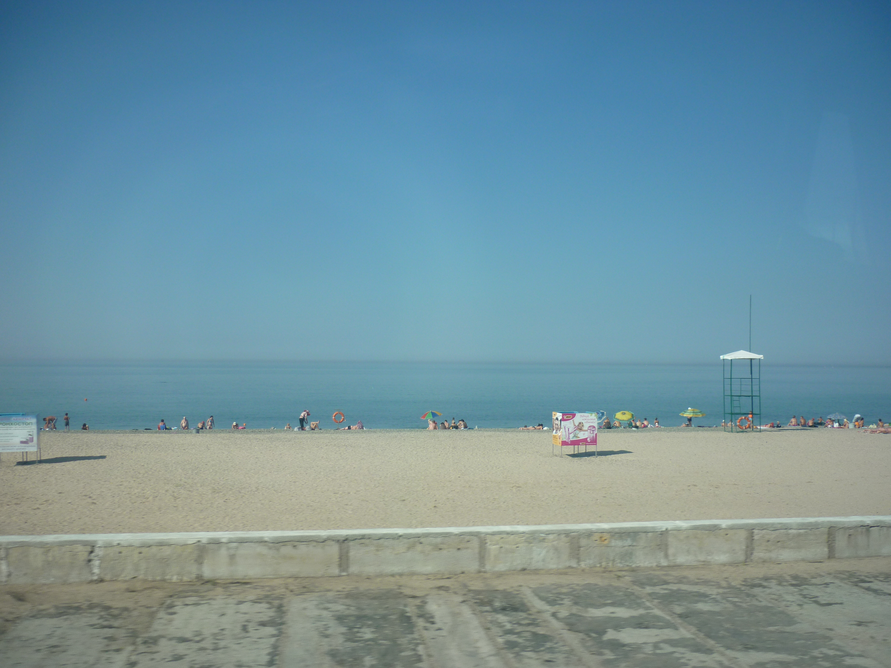 морський заміський пляж в місті Євпаторія Автономної республіки Крим